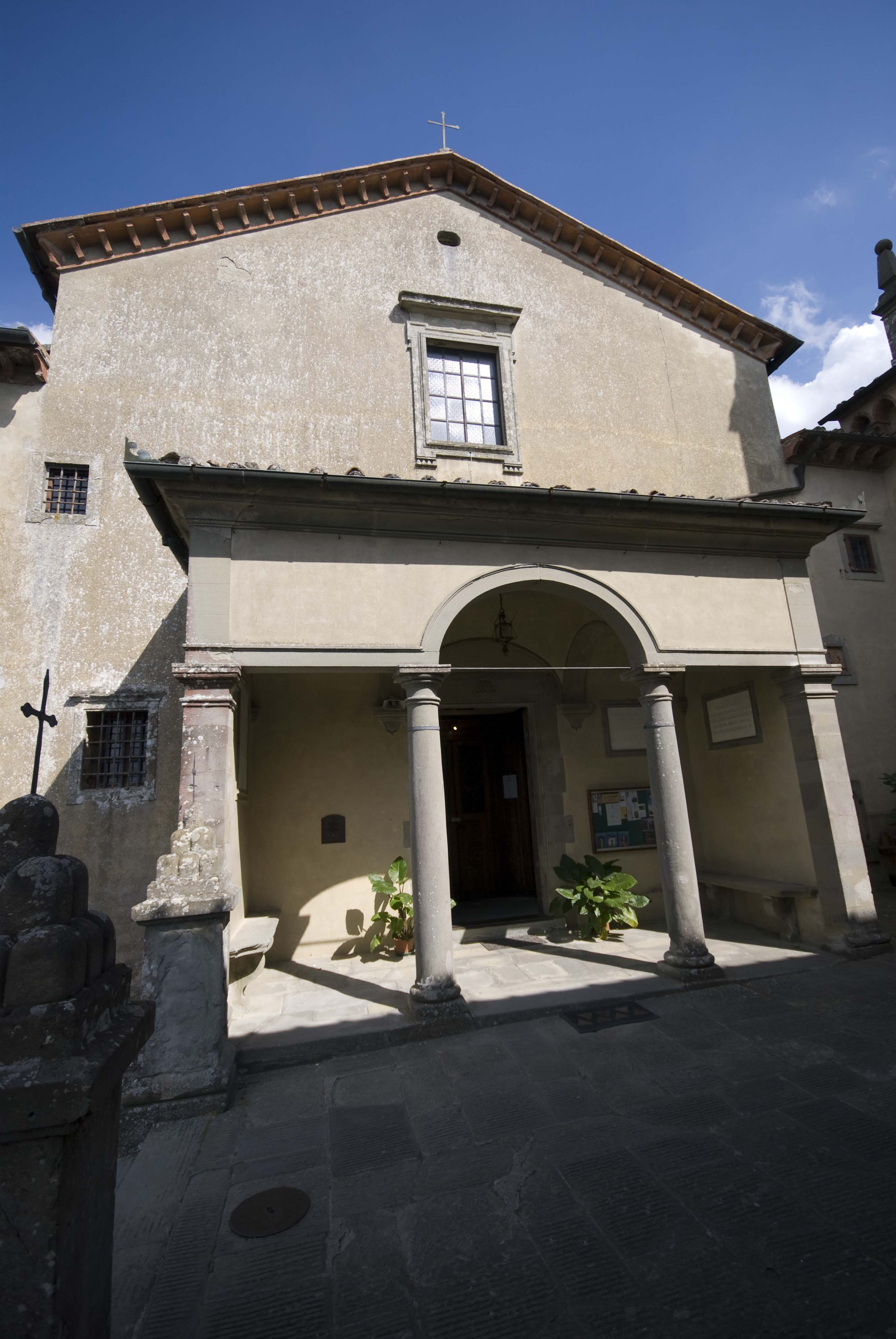 Facciata della chiesa di montesenario